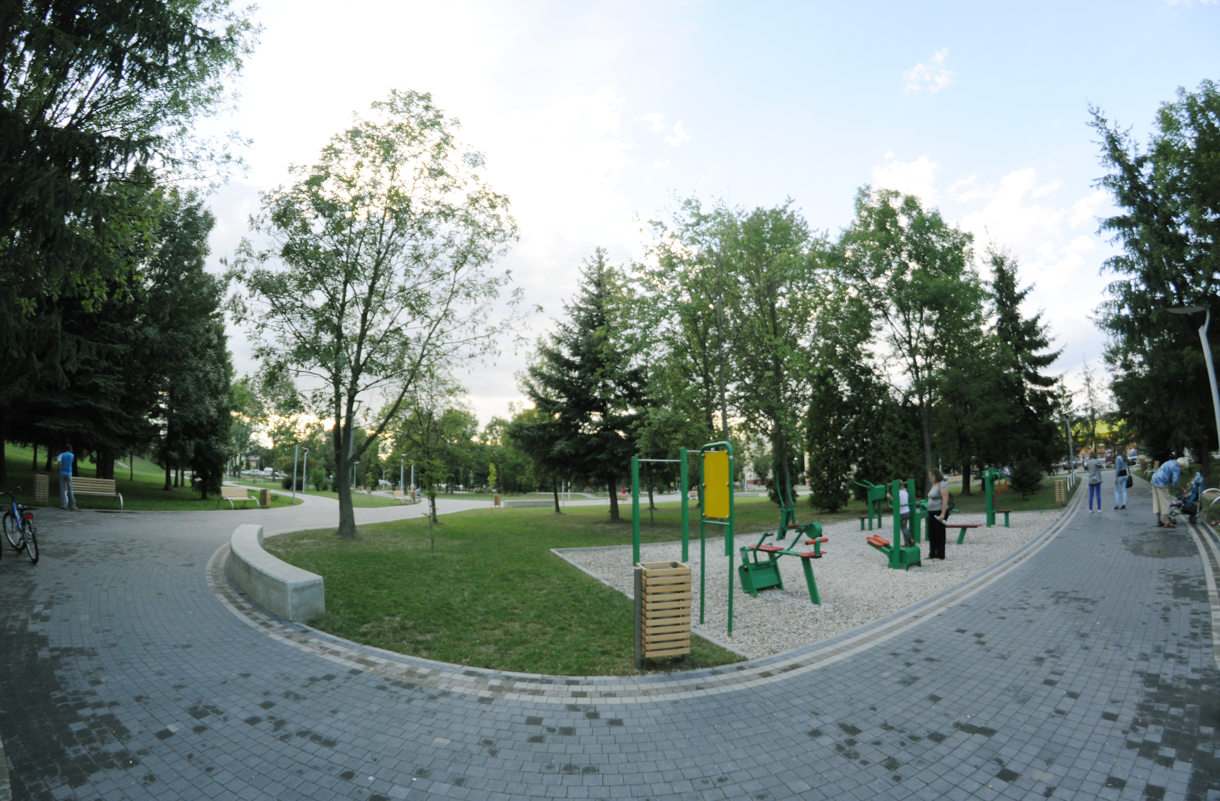 Siłownia w parku miejskim im. Adama Bienia w Staszowie w 2012 r.